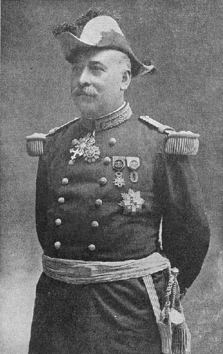 French general Charles Lanrezac (1852-1925)